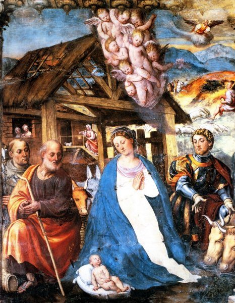 Il Pordenone - Natività (1527) - Chiesa di Santa Maria dei Battuti, Valeriano